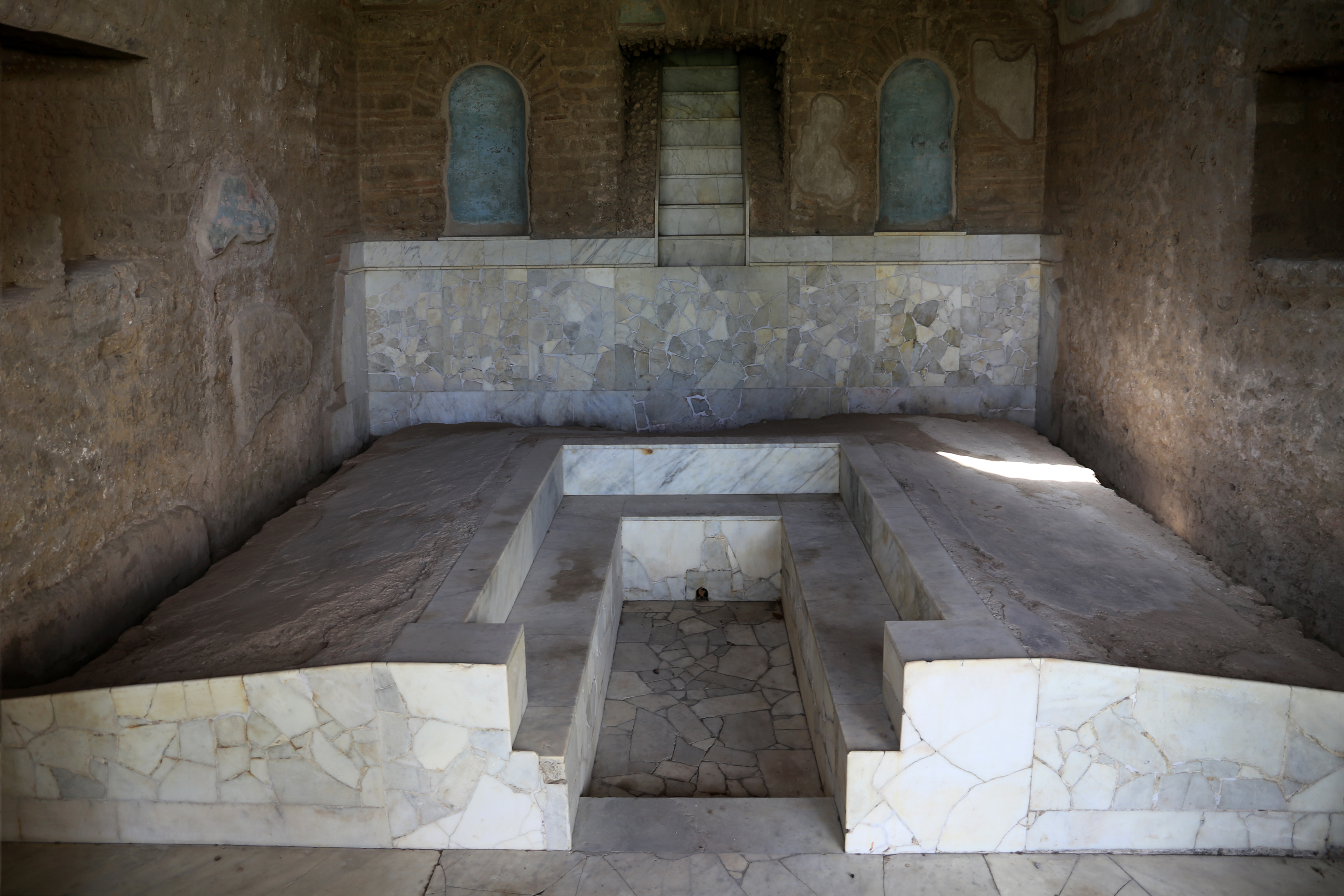 Villa di Giulia Felice (II.4.3) This is a photo of a monument which is part of cultural heritage of Italy.